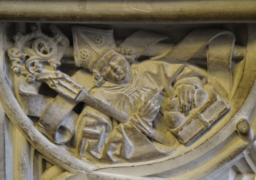 Cathédrale St-Nicolas de Fribourg (Suisse). Saint Nicolas de Myre sur les fonts baptismaux.